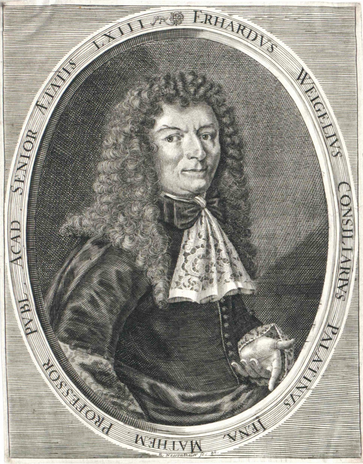 Erhard Weigel (1625–1699), im Alter von 63 Jahren